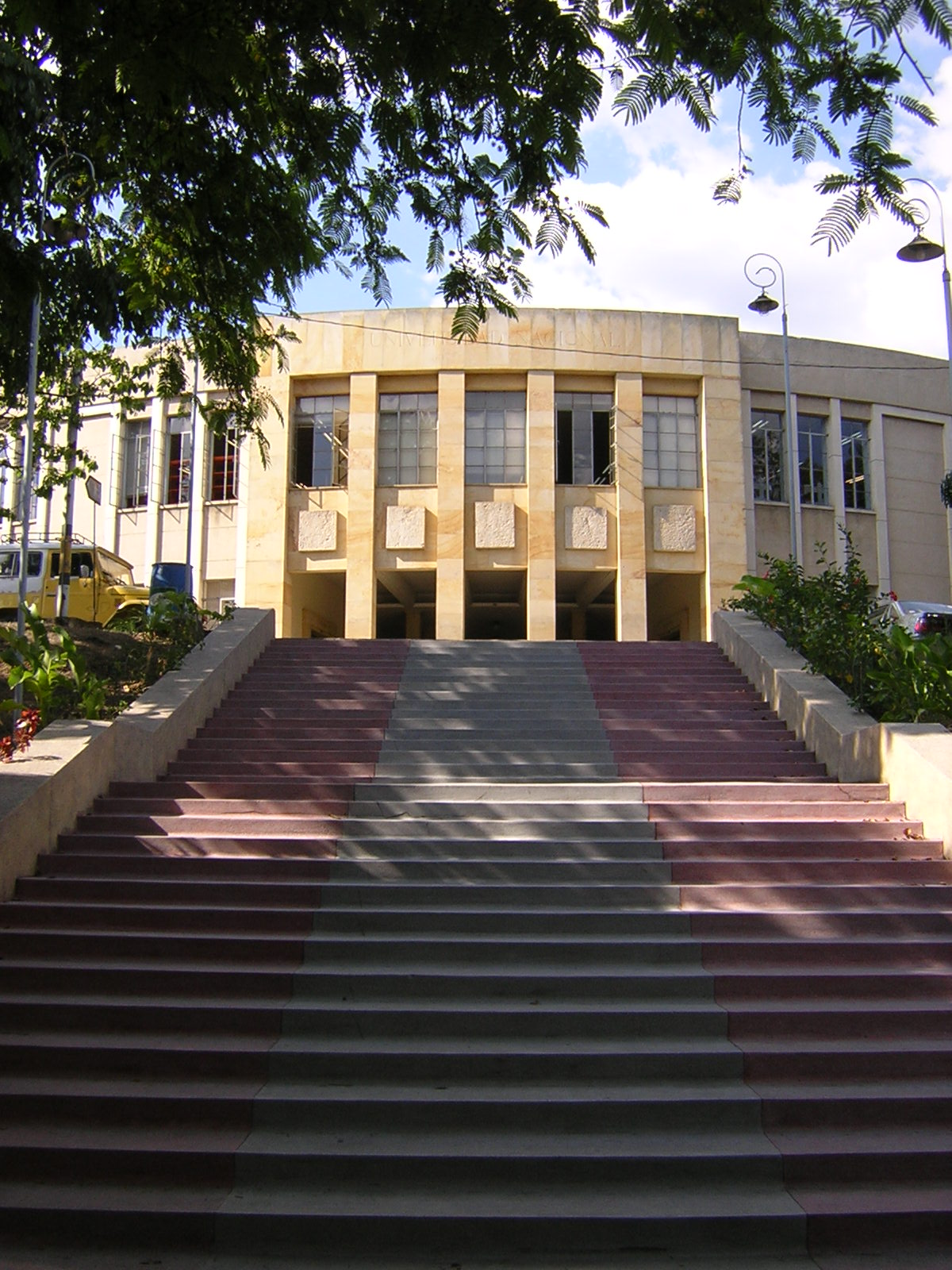 bloque M5, Facultad de Minas, Universidad Nacional de Colombia sede Medellín. Colombia